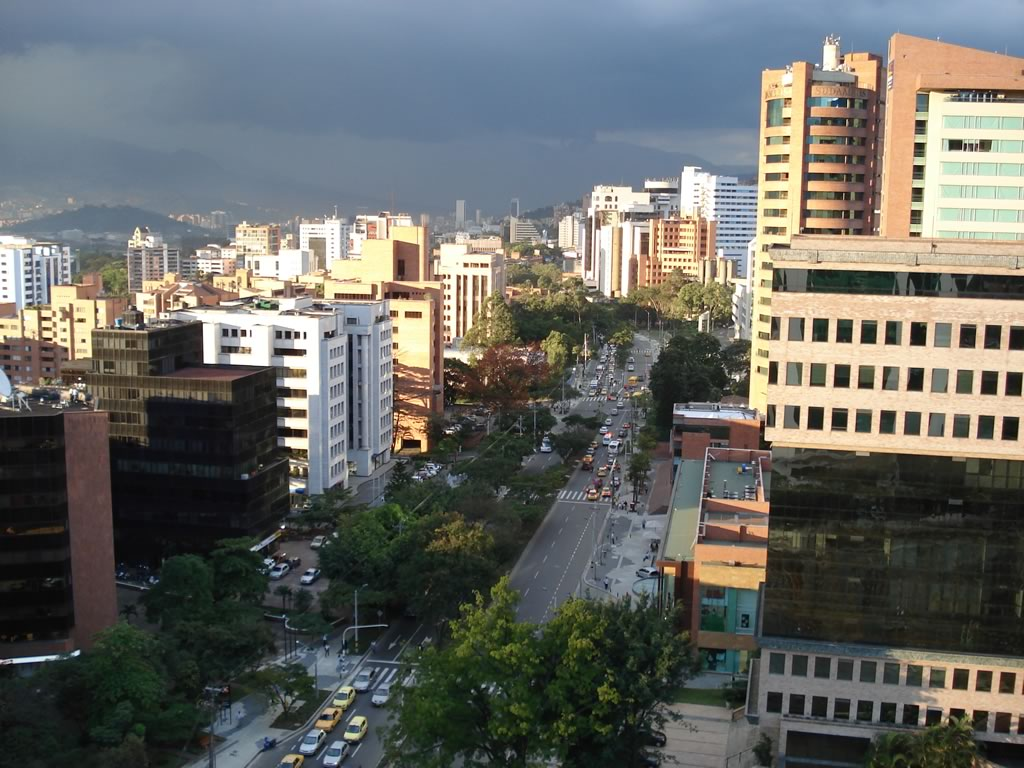 Avenida El Poblado, al sur de Medellín, Colombia.tarde Medellín